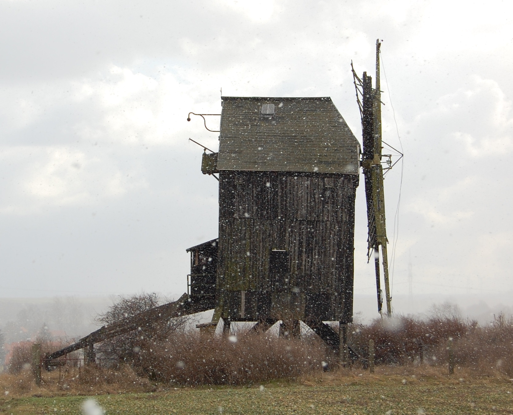 Mühle nördlich von Ostingersleben, bei Schneefall, wenige Sekunden bevor ich bei der Mühle war, war noch schönes Wetter mit Sonnenschein und dann leider nur doch das stark verschneite Foto